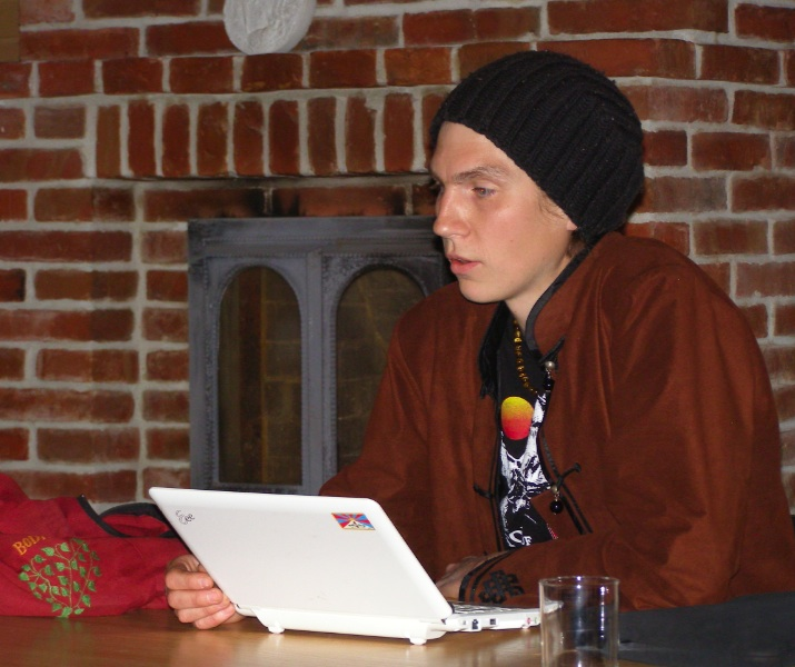 Roy Strider esinemas 11. semiootika kevadkoolis Tuhalaanes Kopra talus.